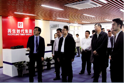 Tony Lee con Secretaria de Zhuhai